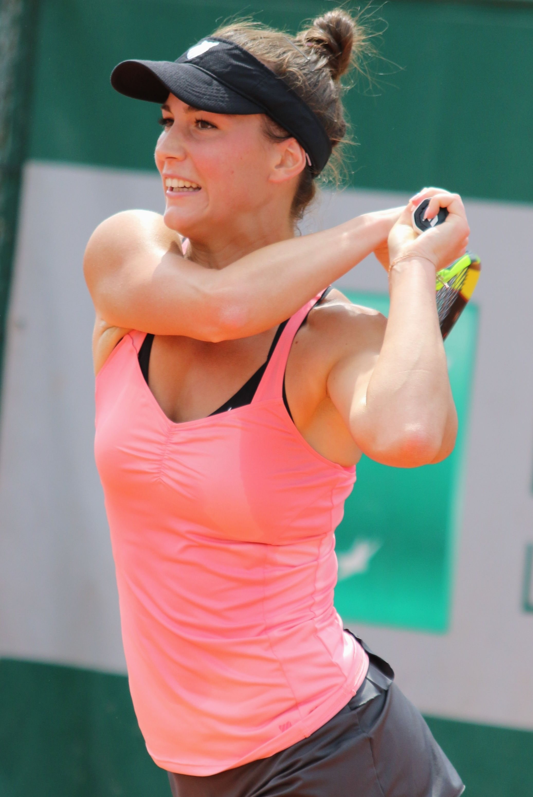 Pera RG18 (11)